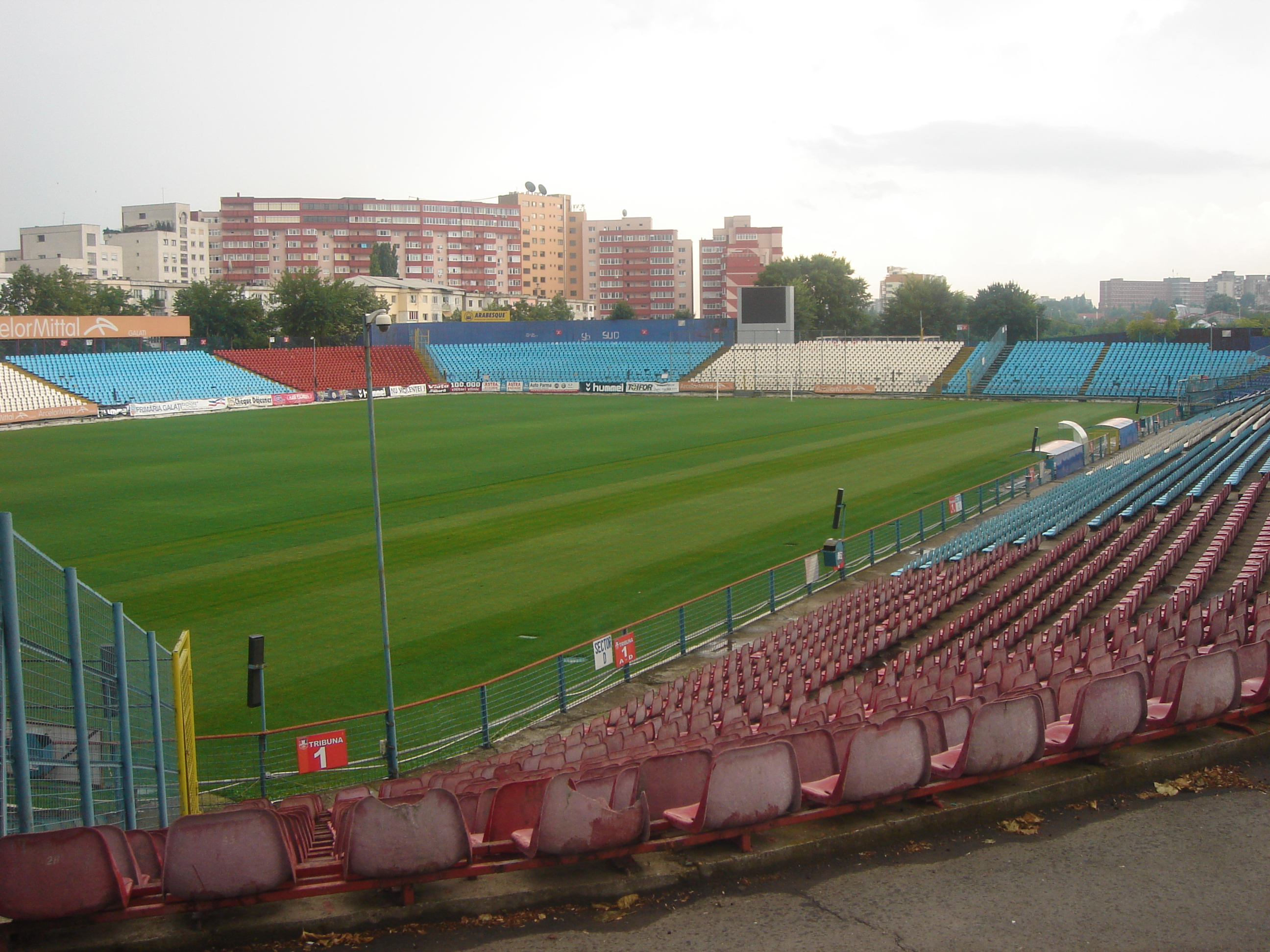 Stadionul Otelul din Galati, capacitate 13500 de locuri, Tiglina 3, Galati